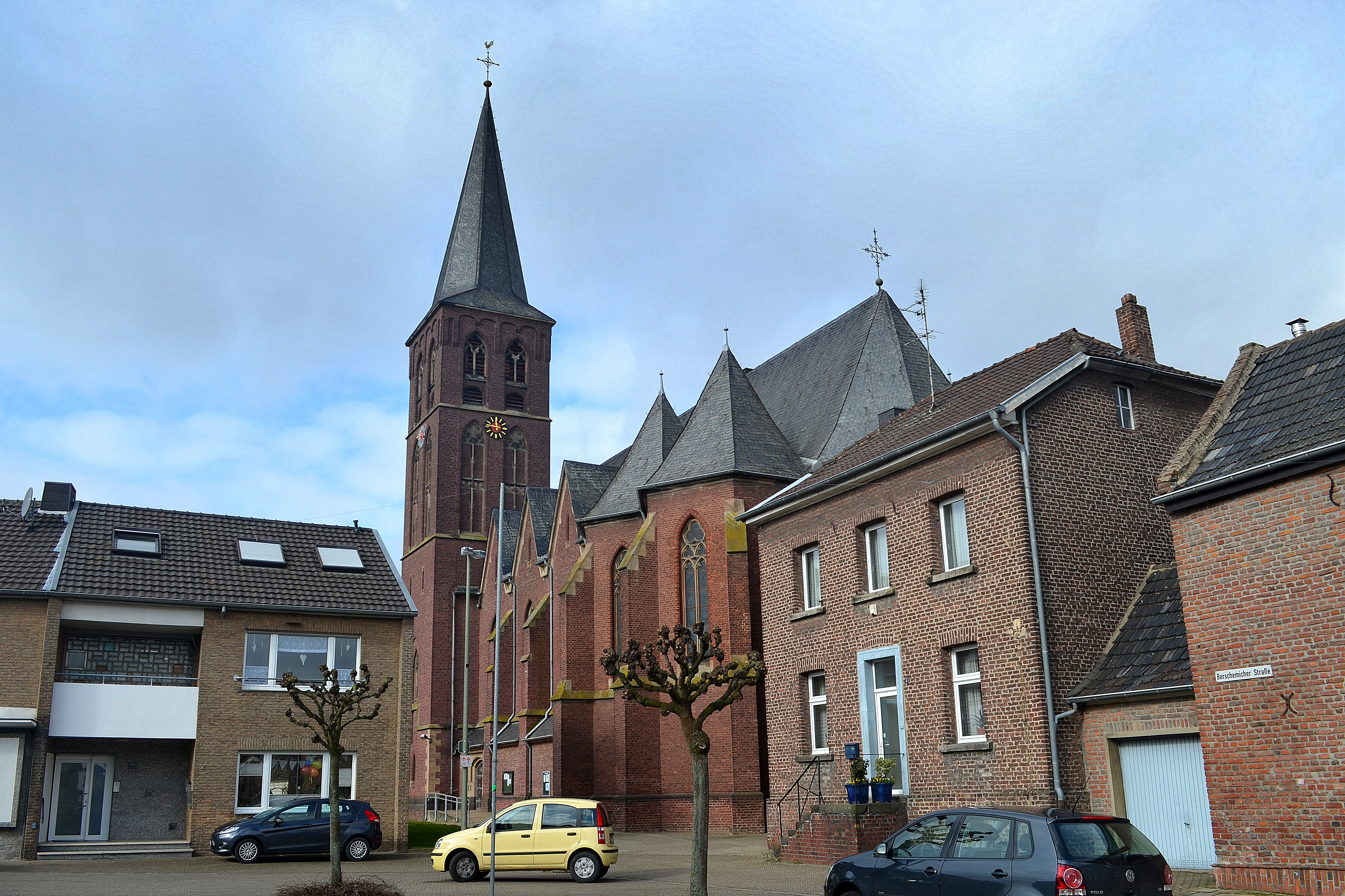 exterieur